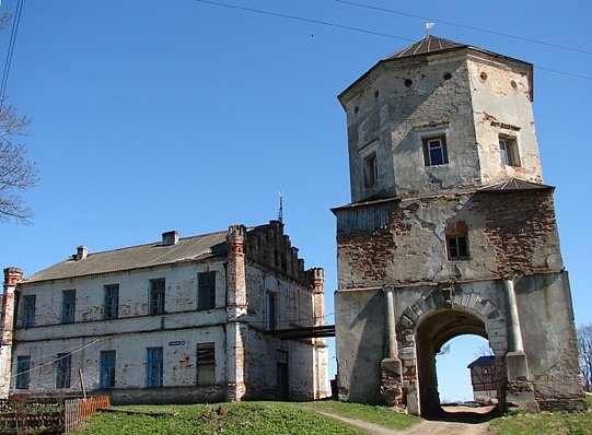 г. Любча, замок, башня-брама, начало XVII в. Фото путешествия по Беларуси.